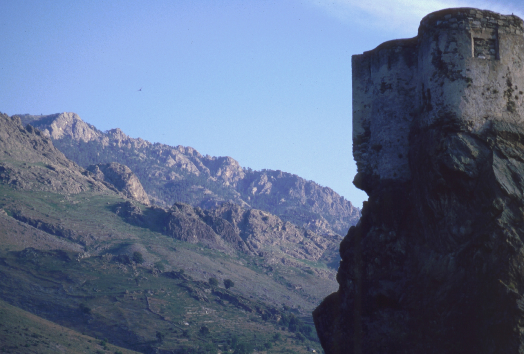 Korsika, Corte, Burg